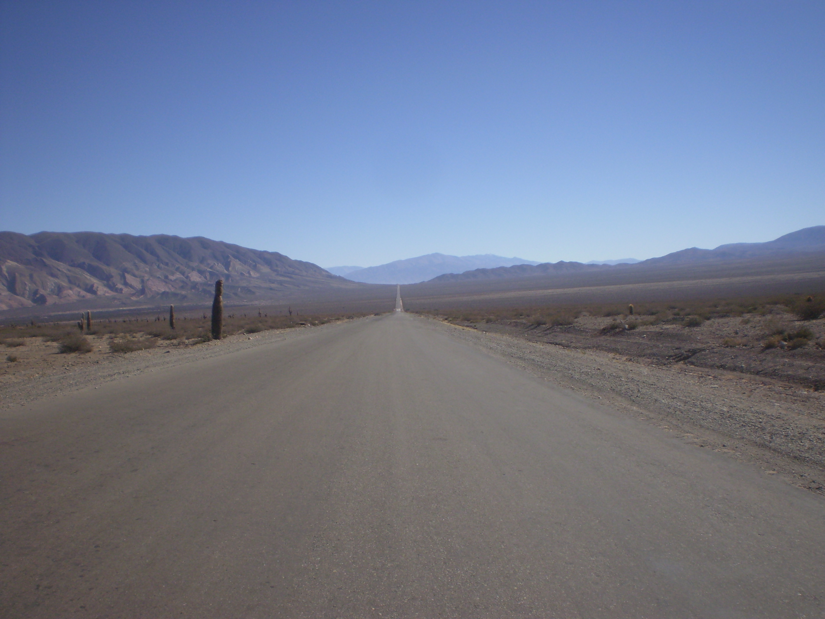 Parque Nacional Los Cardones, Salta, Argentina. Recta de Tin Tin (16 km) construída sobre un antiguo camino inca.